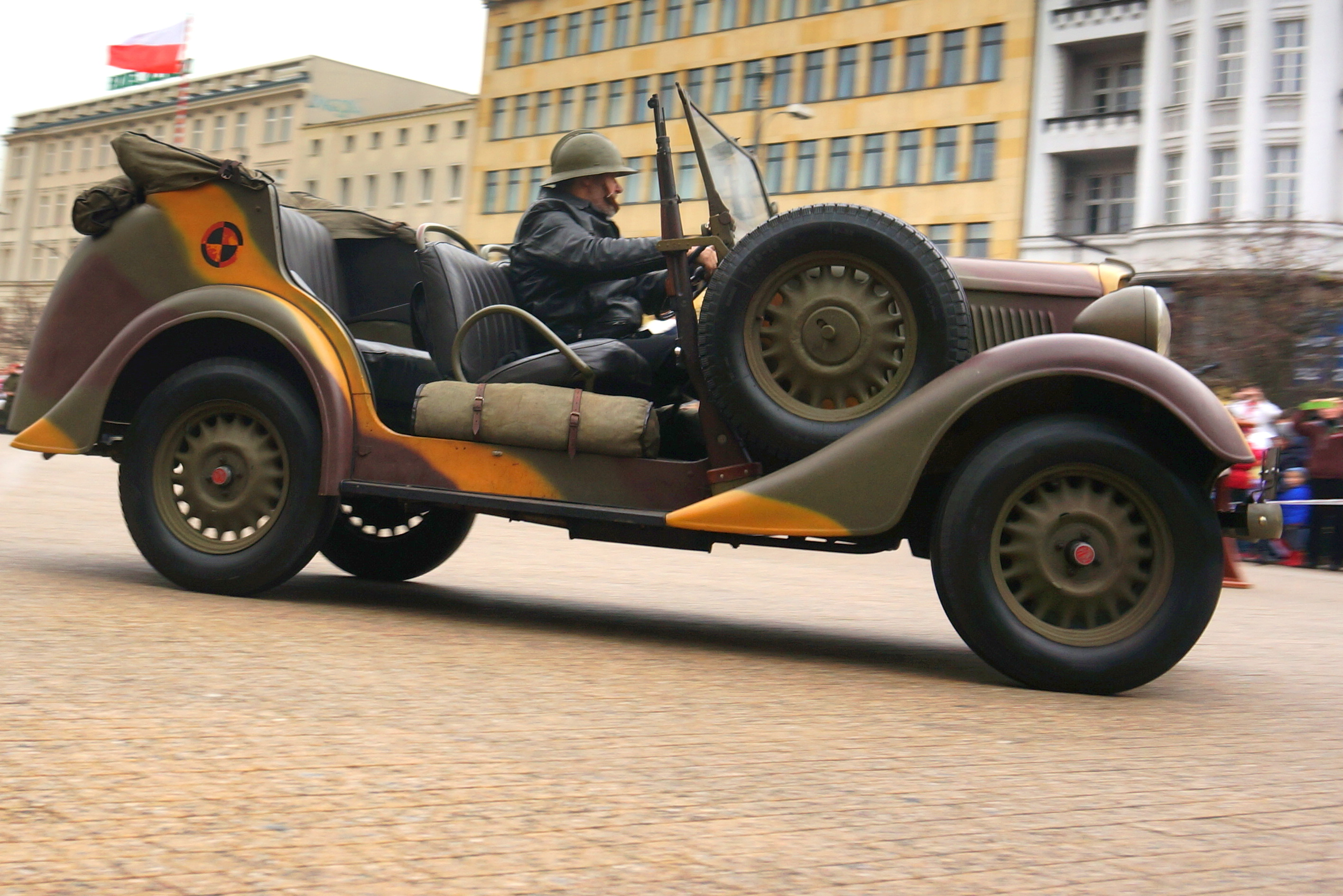 Wersja wojskowa Polskiego Fiata 508 ( Polski Fiat 508 III/W Łazik )